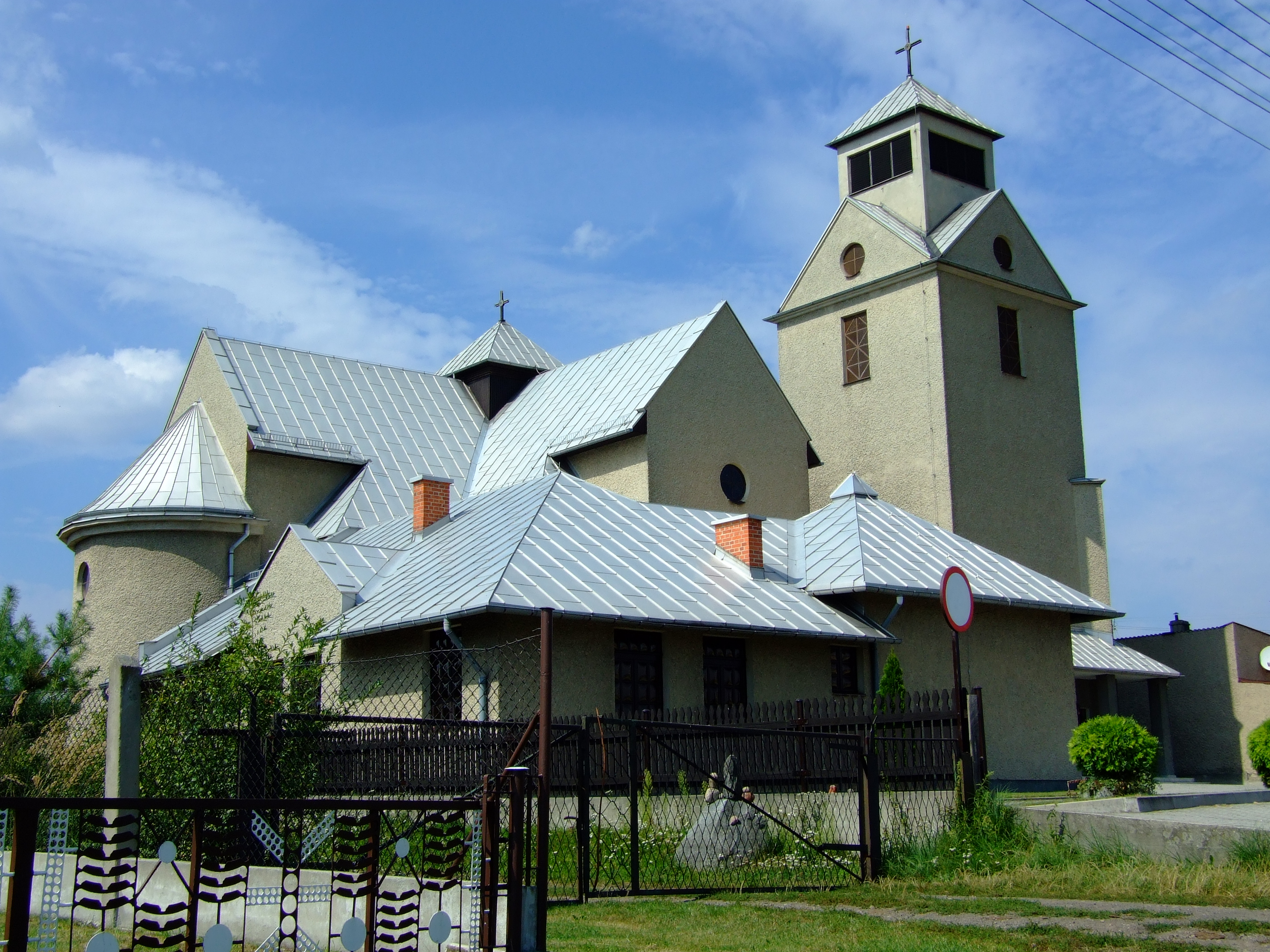 Kościół pw. Trójcy Świętej w Bycinie